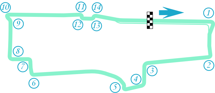 circuito di Montreal Formula E